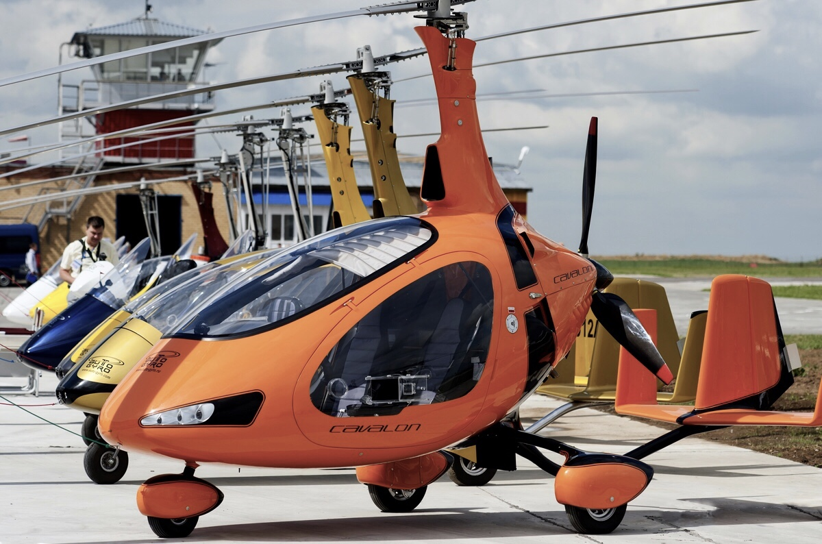 10.06.2014. Airfield Voskresensk